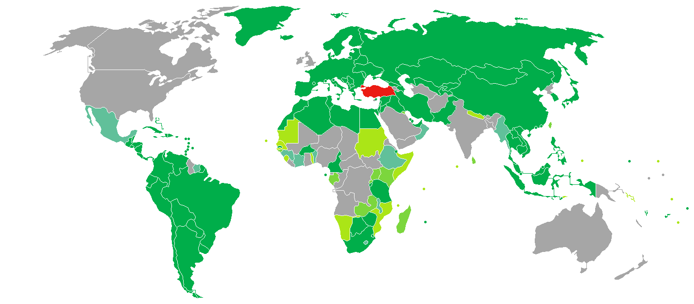 Map of Visa requirements for Turkish Special Passport Holders